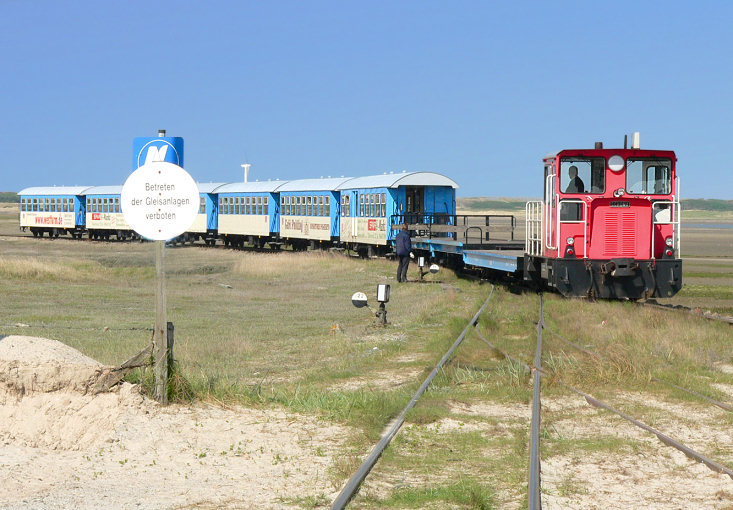 Inselbahn Wangerooge am Westanlager.